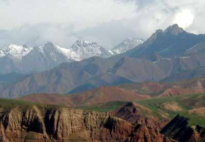 Blick auf die Gebirgszüge des Qilian Shan (hier von der Kreisstadt Qilian in Qinghai aus) Foto: Andreas Gruschke (Freiburg)